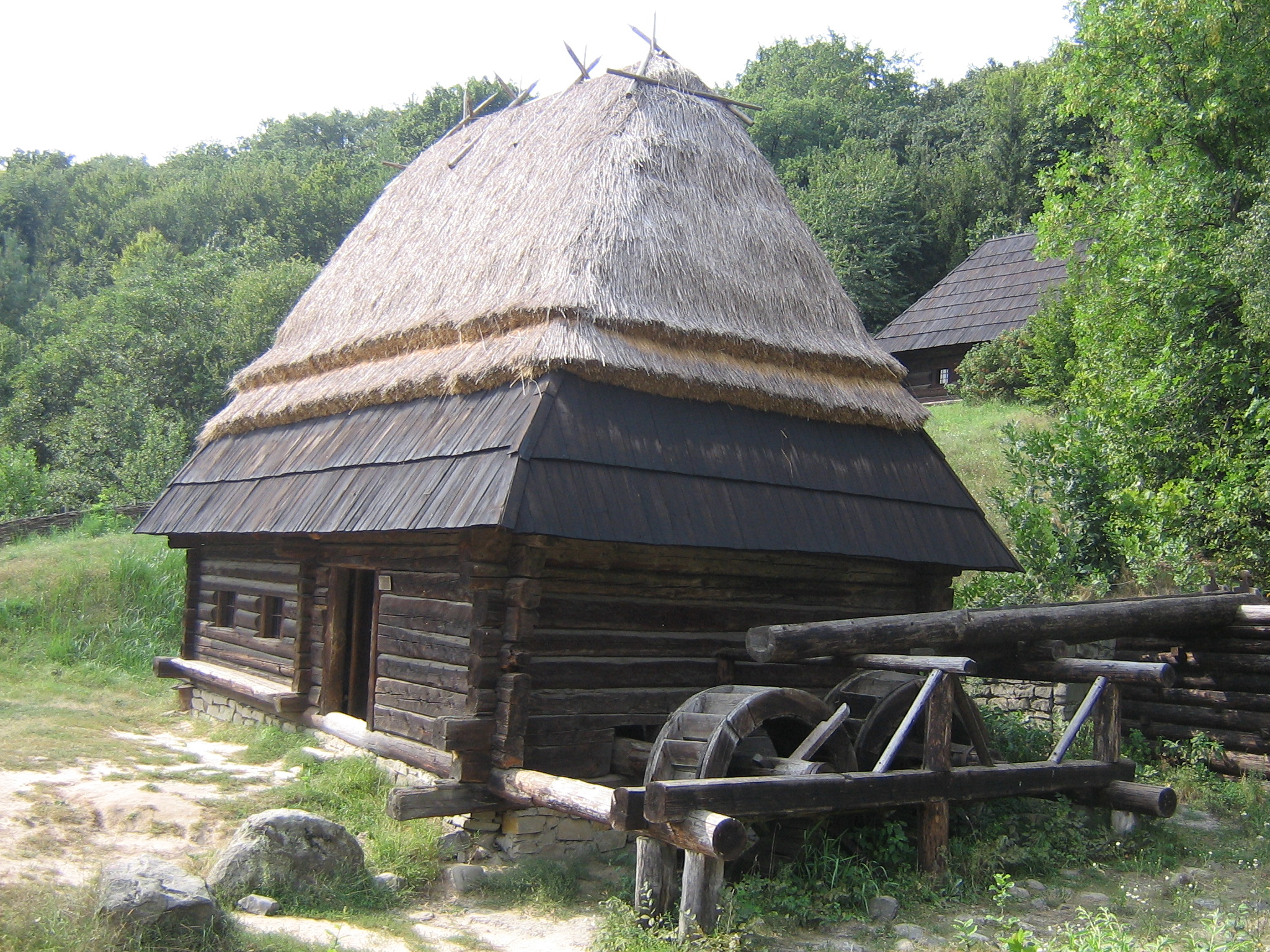 Водяний млин з села Пилипець у скансені Пирогово